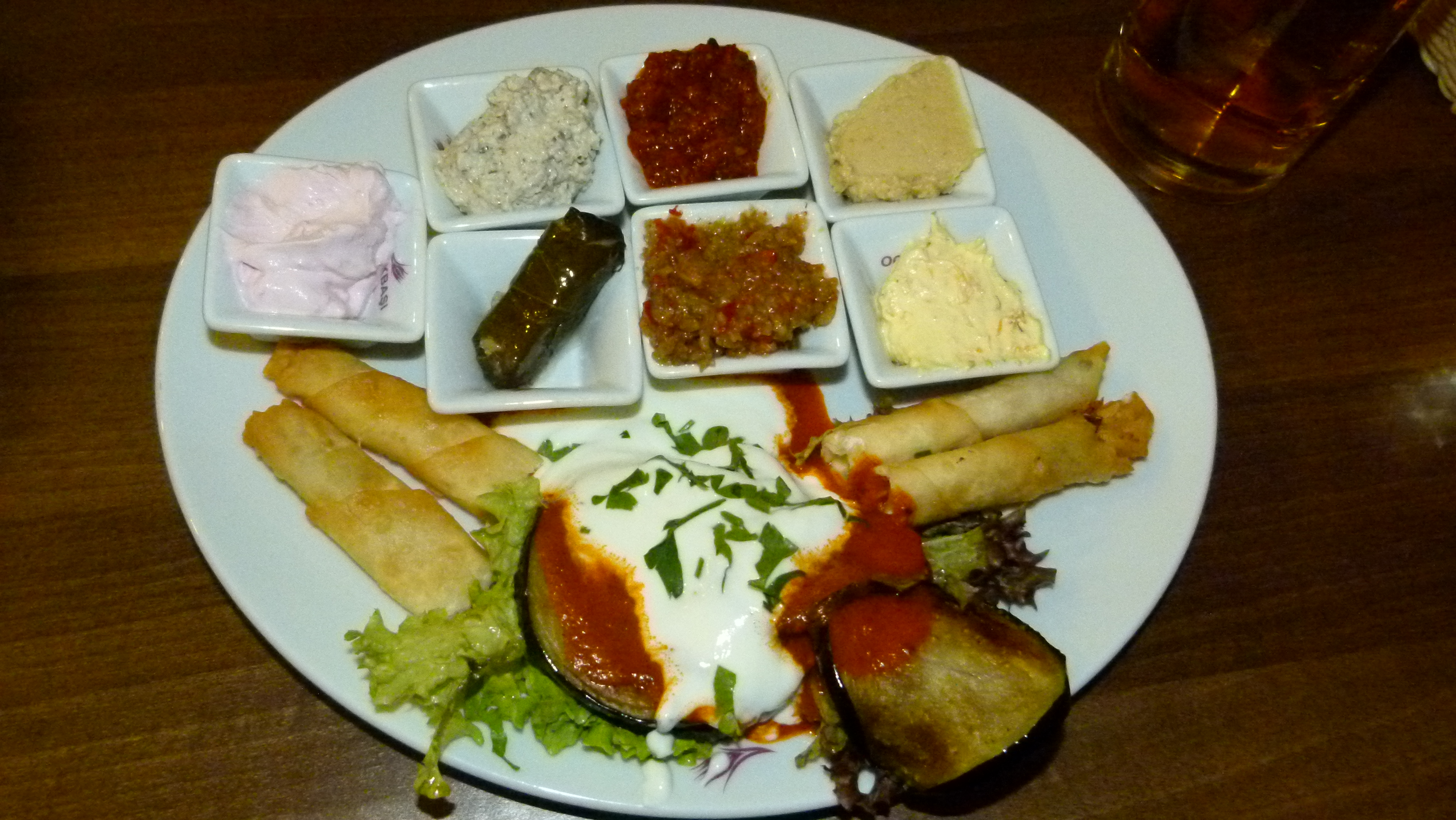 Karisik Meze Tabagi - Gemischter Vorspeisenteller, Türkisches Restaurant OCAKBASI, Dresden